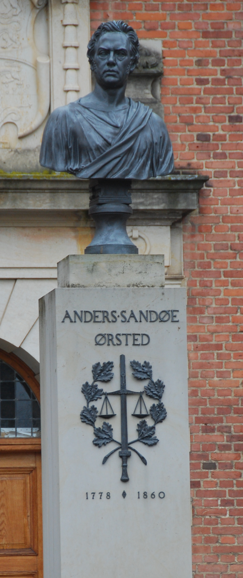 Buste af Anders Sandøe Ørsted placeret foran Vestre Landsret i Viborg.